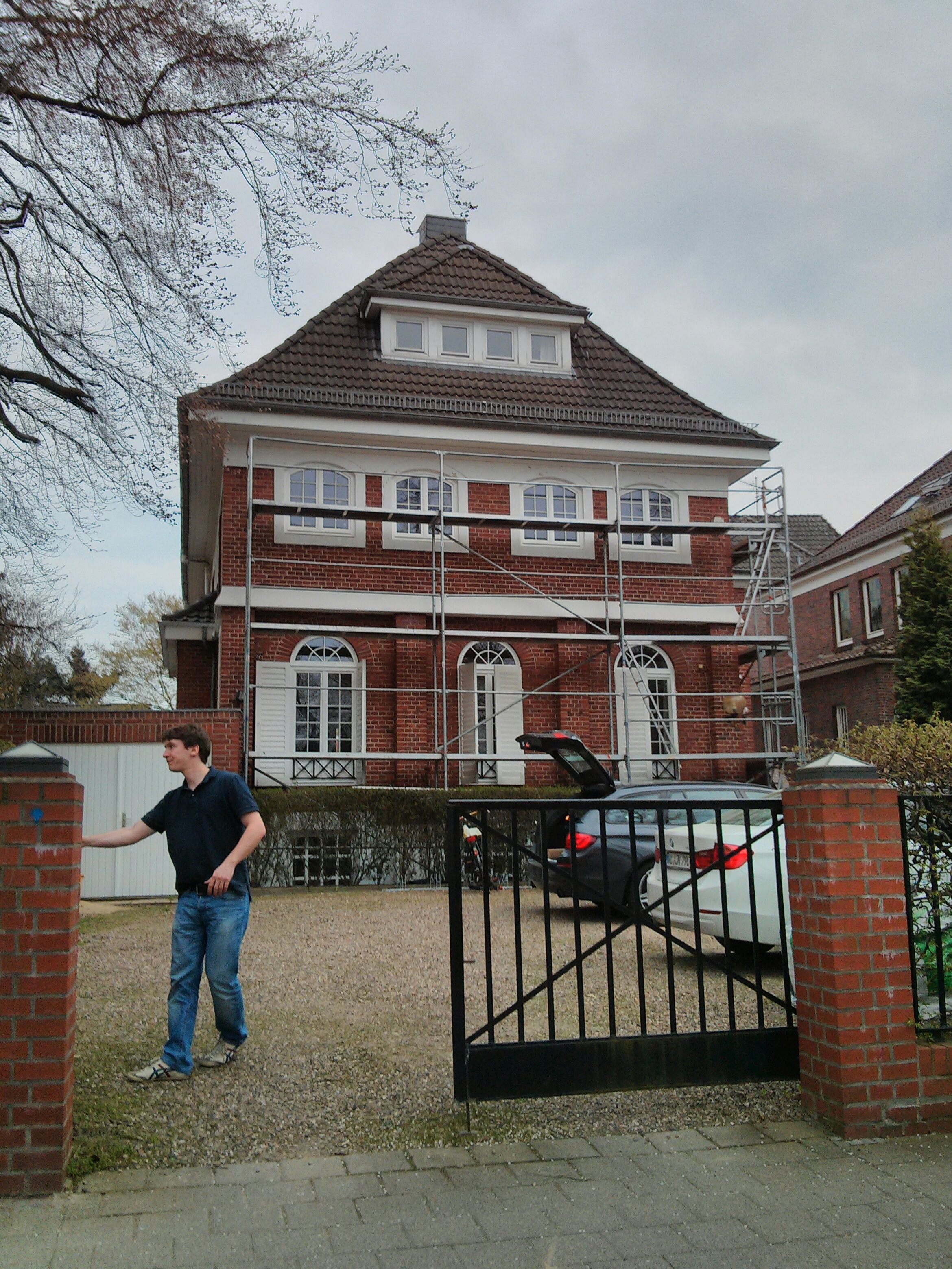 Haus Wiedemann in Bremen, Schwachhauser Heerstraße 163 Das abgebildete Objekt ist ein geschütztes Kulturdenkmal in der Freien Hansestadt Bremen, mit der Nr. 1124 beim Landesamt für Denkmalpflege registriert.